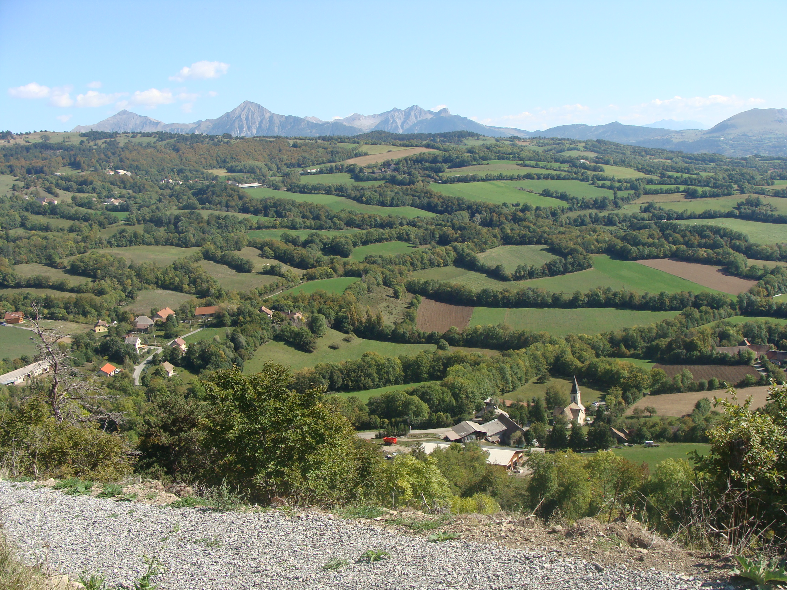 Paysage de bocage en Champsaur, vu du "site des trois-croix", commune de Saint-Bonnet-en-Champsaur (Hautes-Alpes). Au premier plan le hameau des Gentillons, anciennement chef-lieu de la commune de Bénévent-et-Charbillac. Au fond de gauche à droite, la Grande Autane, la Petite Autane et le Piolit.